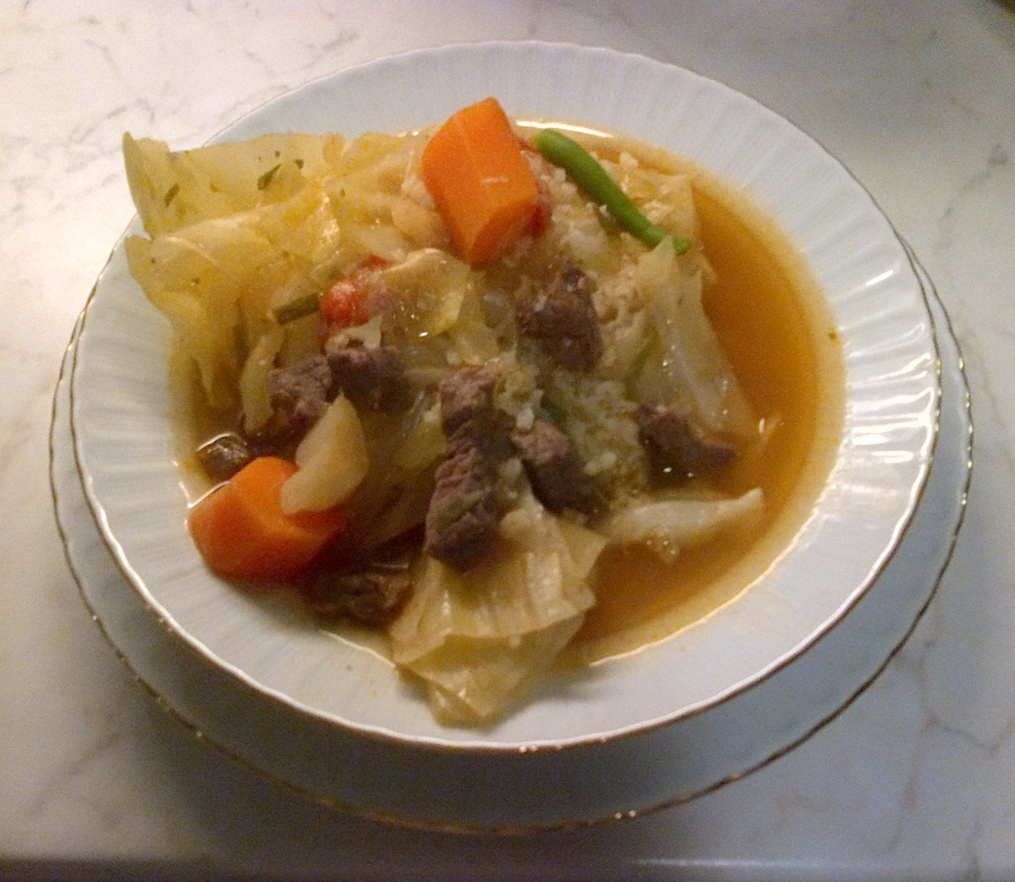 Kapuska es un estofado de la cocina turca, a base de repollo; en este plato con carne de ternera y un poco de arroz en su caldo.